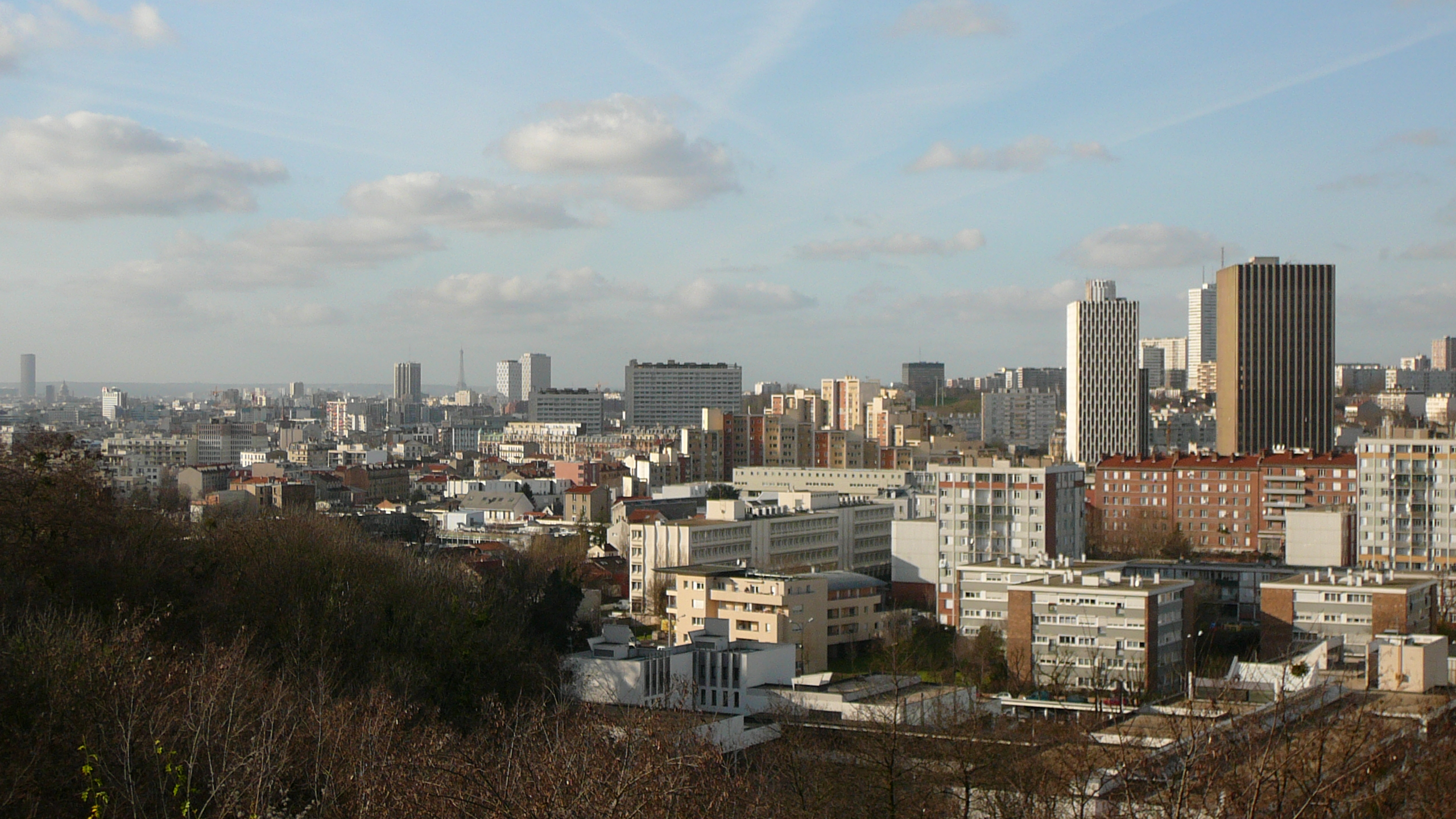 Panorama de Montreuil, France, depuis le parc des Beaumonts